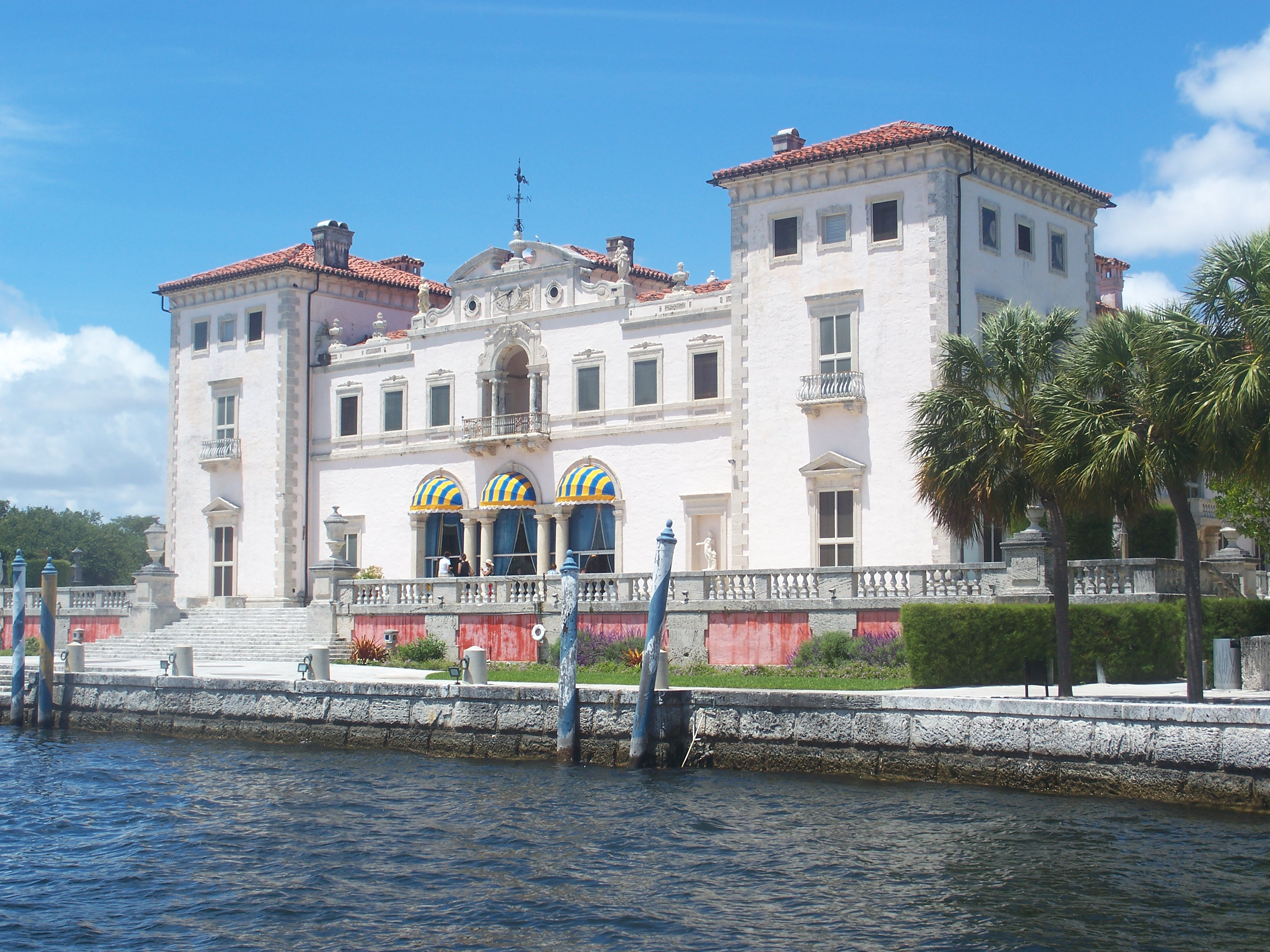 Coconut Grove, Florida: Villa Vizcaya